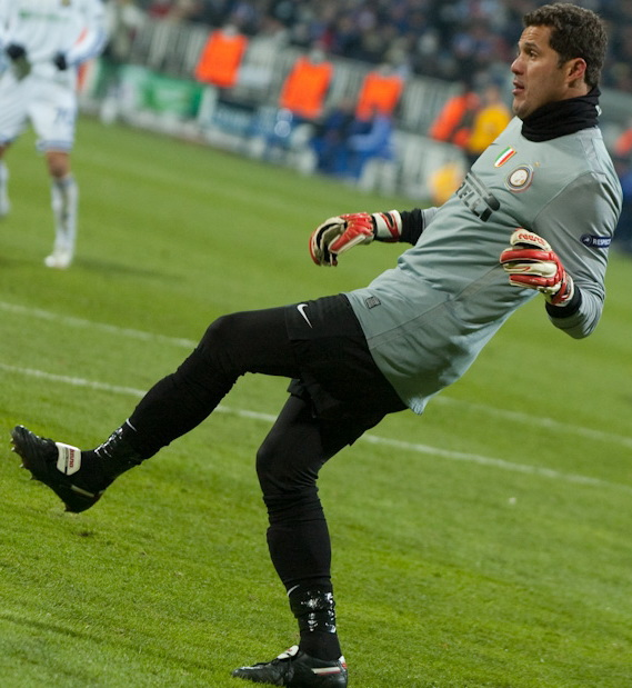 Júlio César Soares Espíndola